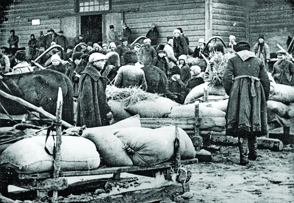 Селяни здають хліб у Баришівському районі Київського округу.